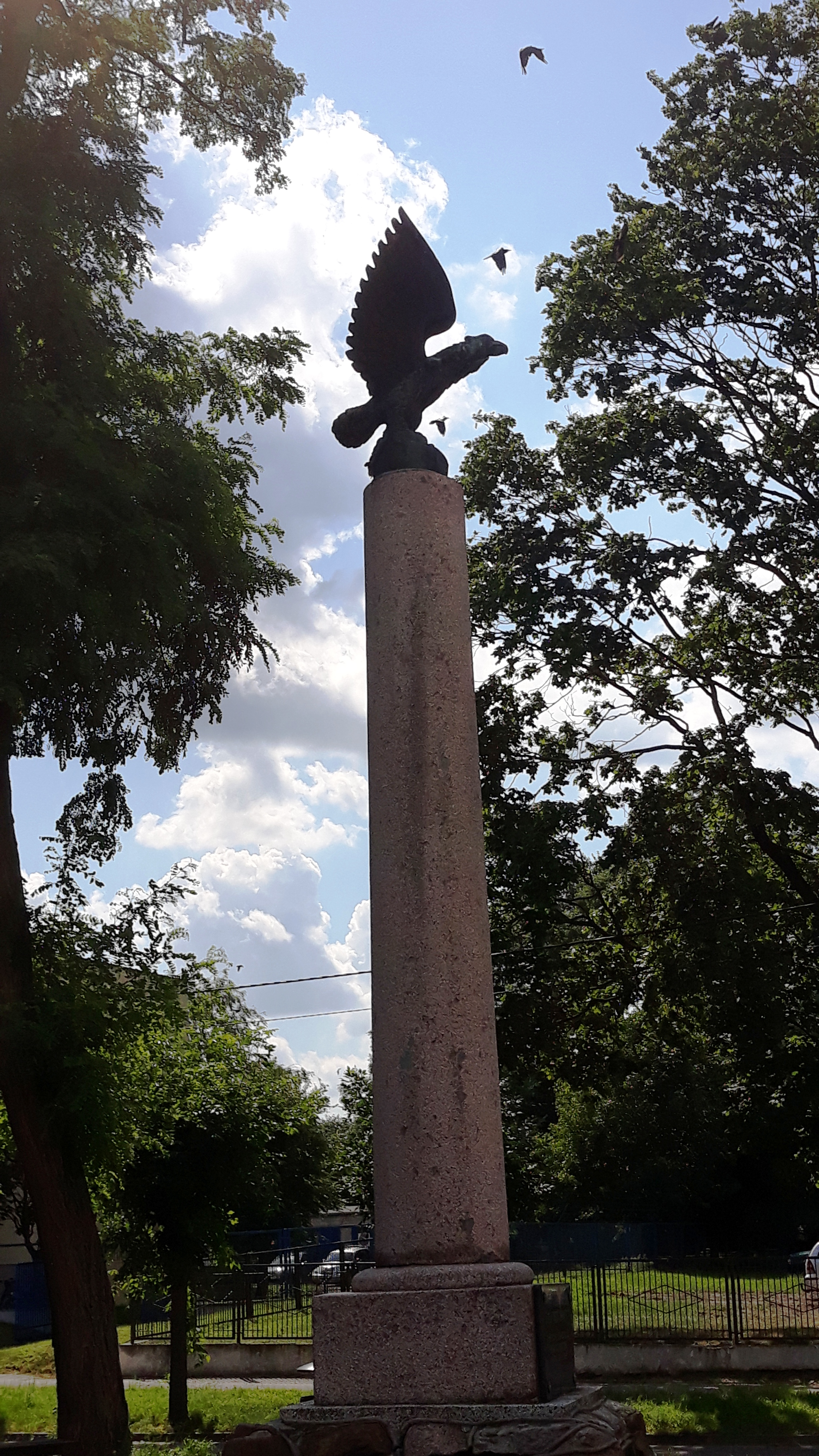 Pomnik Niepodległości w Parczewie z 1928r.